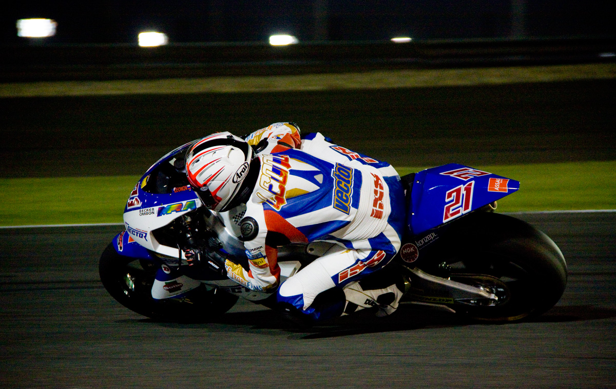 Motonews.ru: Владимир Леонов на гран-при Катара